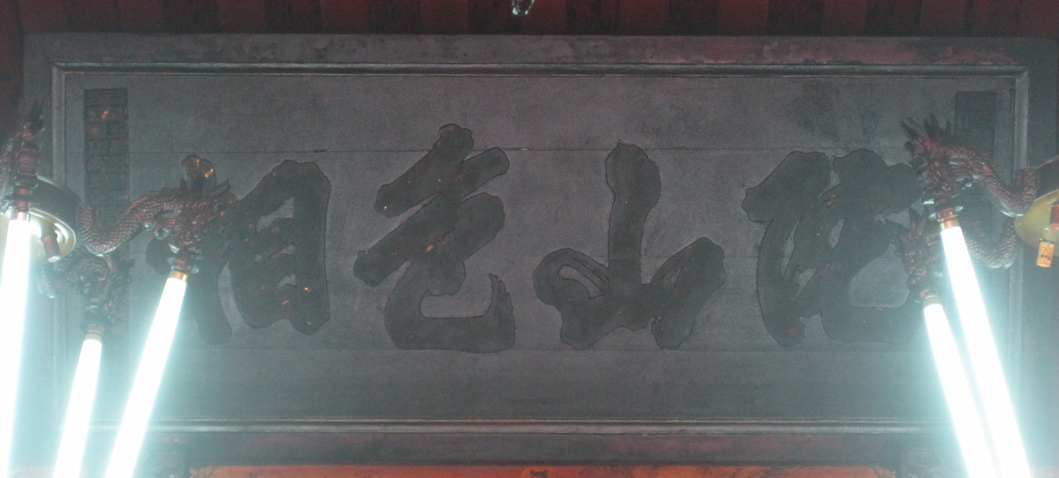 中文（台灣）: 玉井北極殿「陀山色相」匾